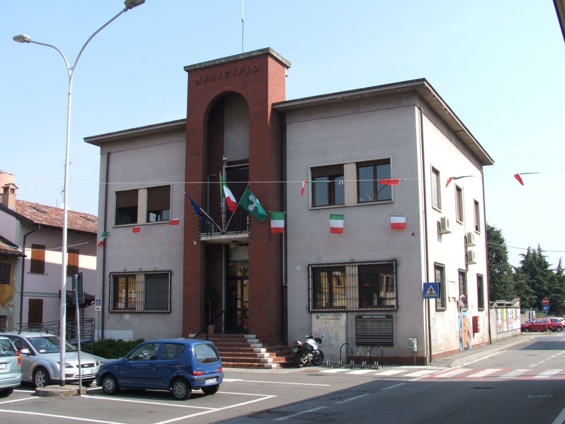 Municipio di Pantigliate (MI)